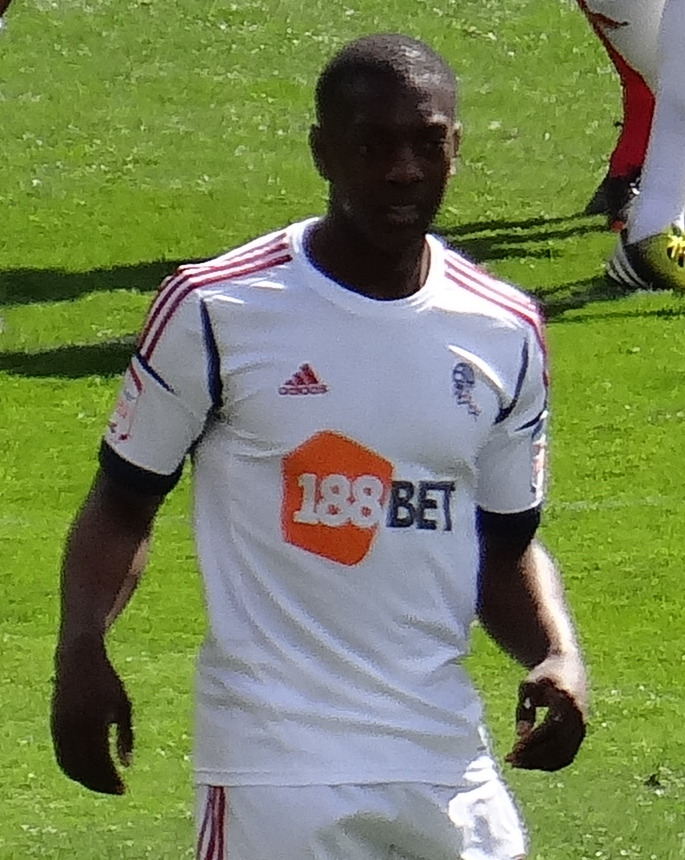 Marvin Sordell playing for Bolton Wanderers